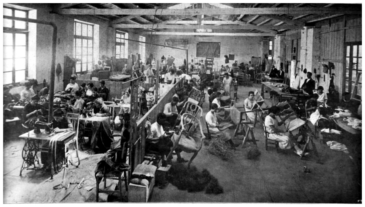 Immagine d'insieme del reparto tappezzeria della Fabbrica di mobili Ducrot, Palermo, dicembre 1927, in La Sicilia e la sua attività industriale, estratto de L'Illustrazione italiana, 1927, 50 (AS Ragusa, Biblioteca, L/86)